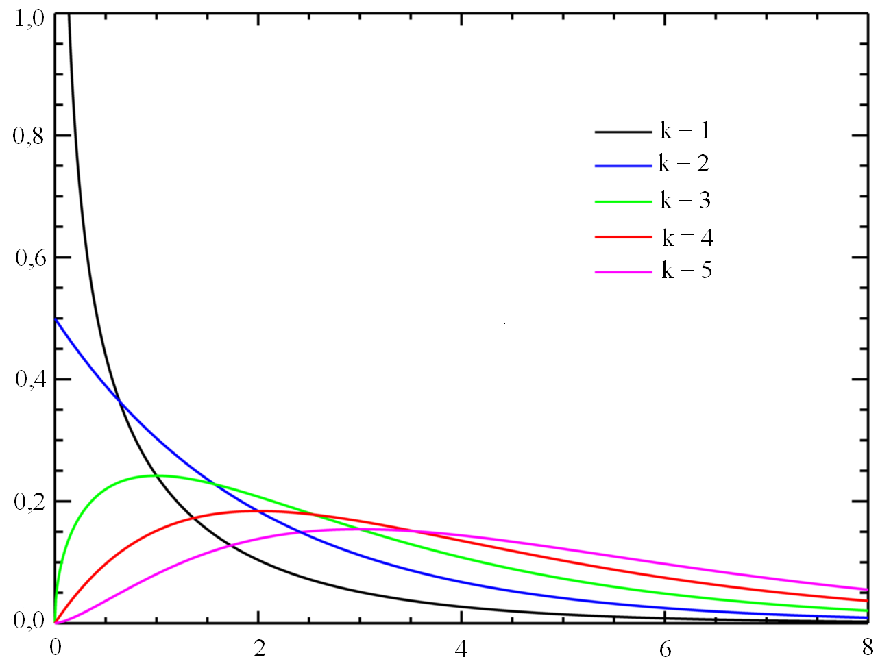 Zbirna funkcija verjetnosti porazdelitve hi-kvadrat.